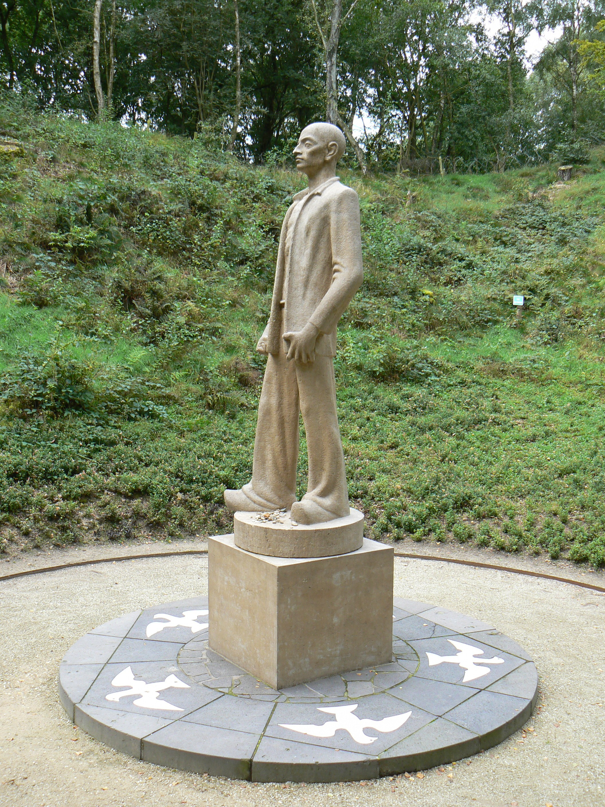 "De stenen man" (1953), National monument: Gevangene voor het vuurpeloton in Kamp Amersfoort/The Netherlands